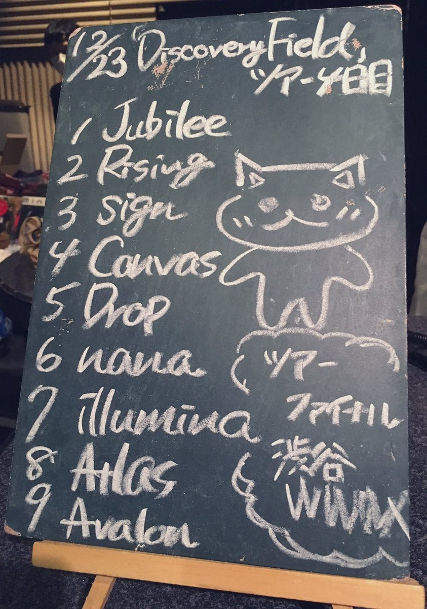 amiinAセトリボード(20181223(1))